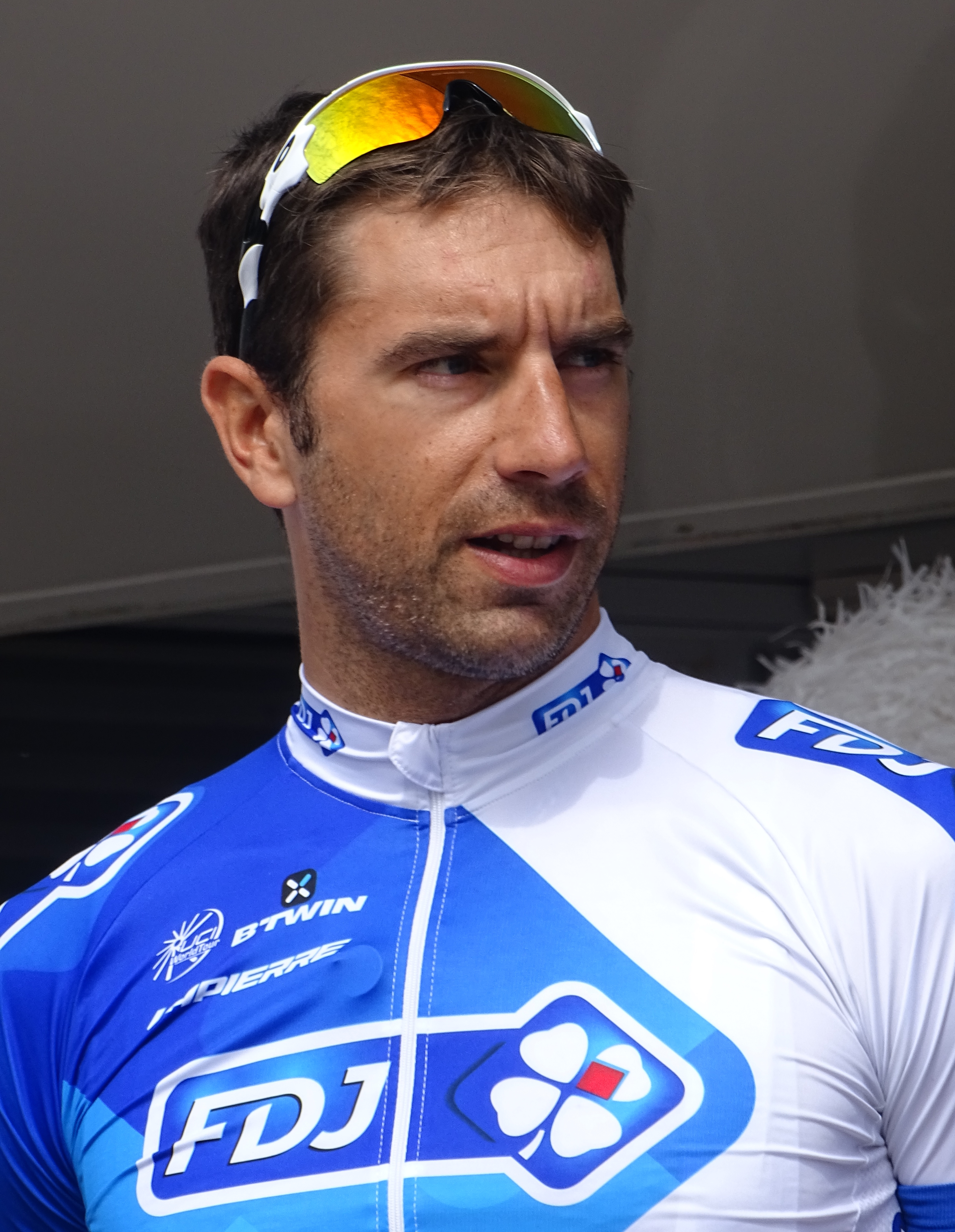 Reportage réalisé le jeudi 16 avril à l'occasion du départ et de l'arrivée du Grand Prix de Denain 2015 à Denain, Nord, Nord-Pas-de-Calais, France.